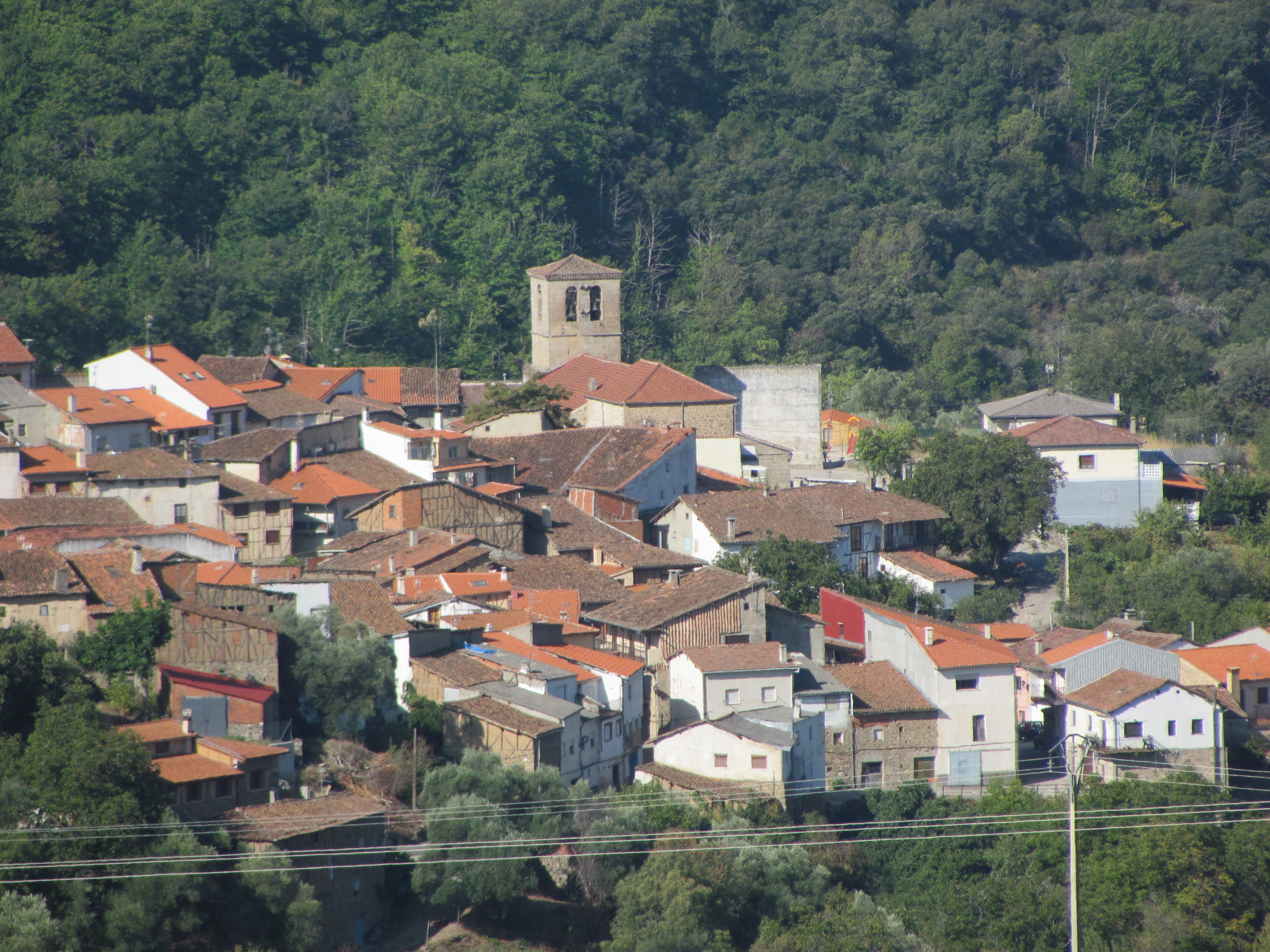 Vista hacia el oeste de San Esteban de la Sierra